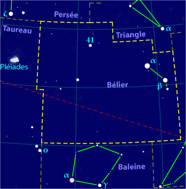 Carte pour la constellation Bélier Produite à l'aide du logiciel PP3